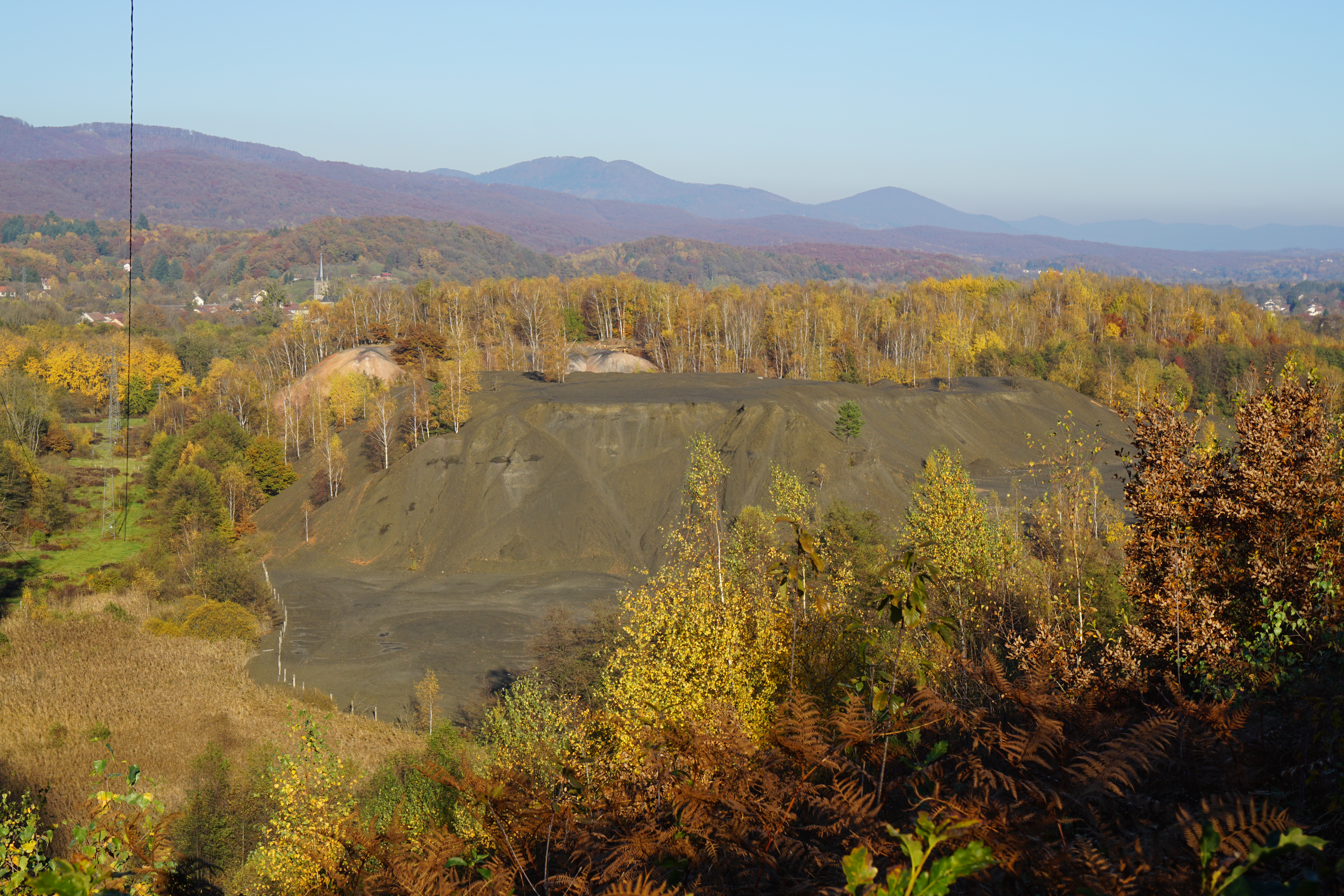 Le terril noir de Magny-Danigon et le terril rouge de Ronchamp et les Vosges vus depuis une colline du Chérimont.